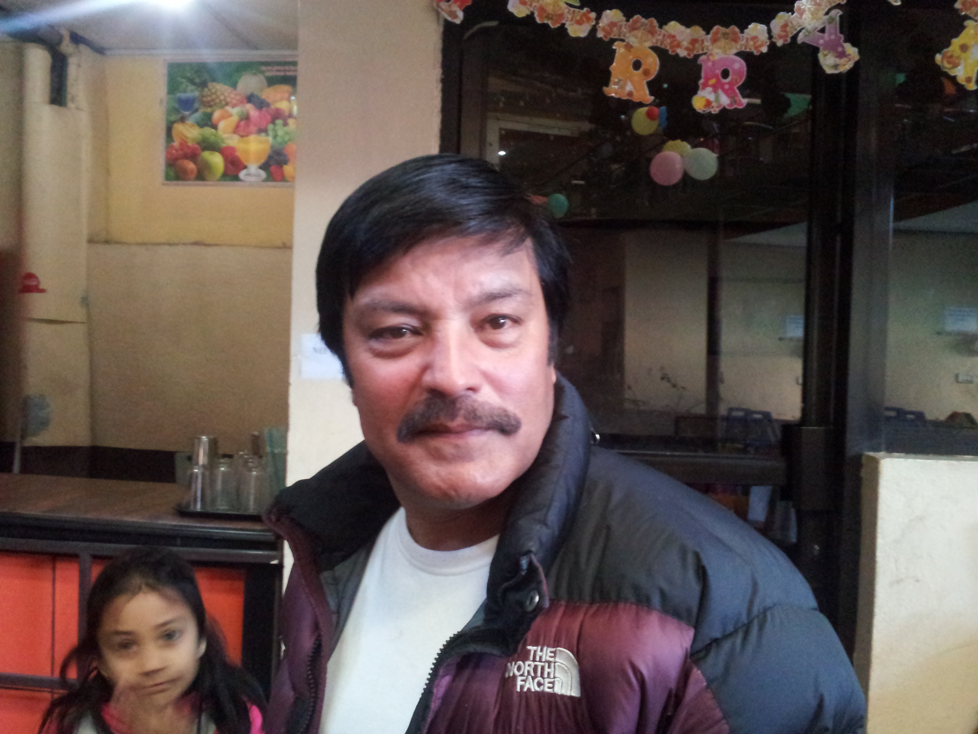 Ravi Giri at Lalitpur 2013